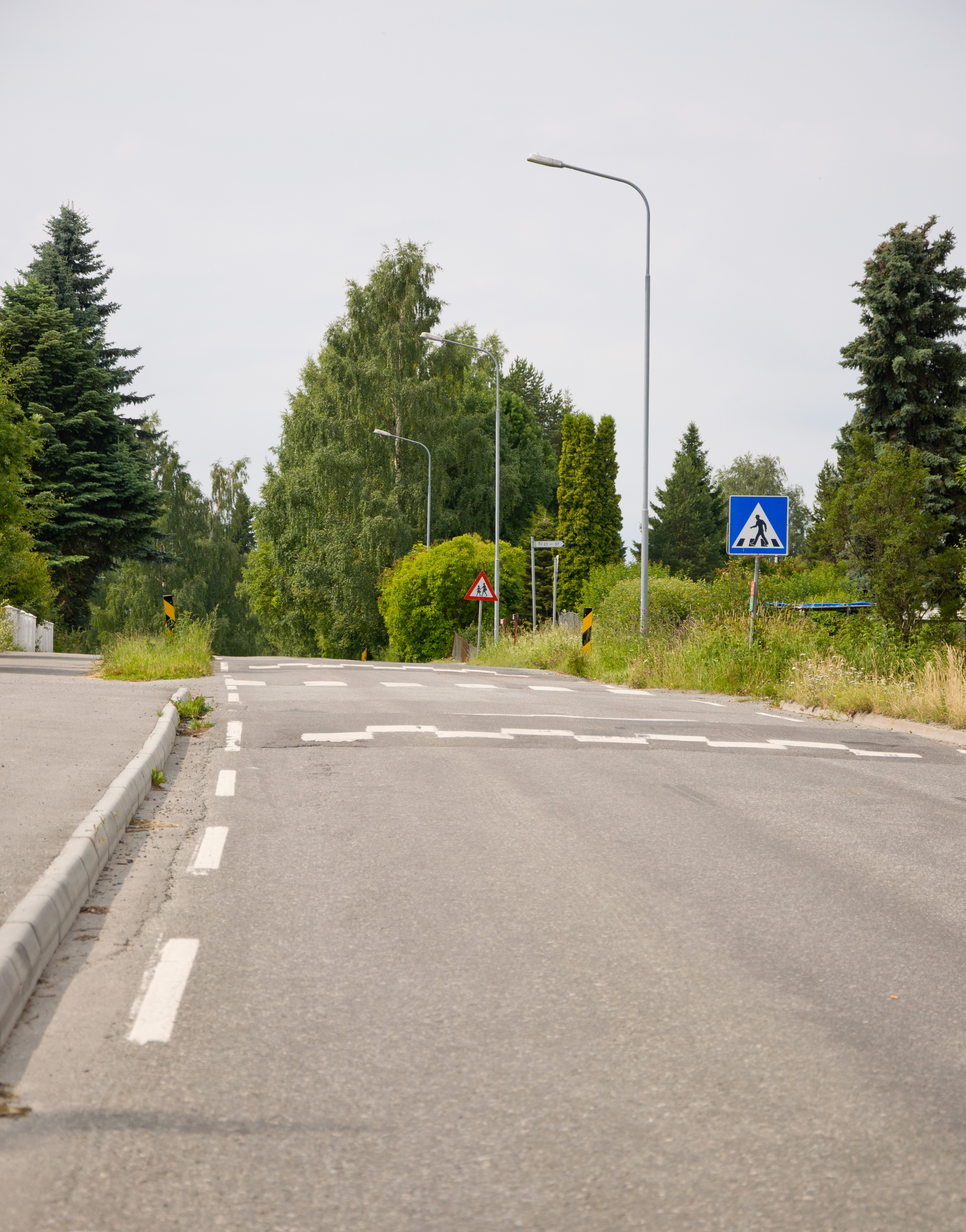 Fylkesvei 1734 (tidl. 66) Kårtorpvegen i Hedmark